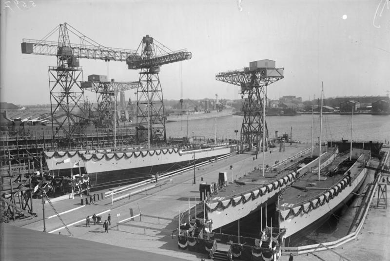 In Wilhelmshaven laufen am 15. März 4 neue Zerstörer der Wolf-Klasse vom Stappel! Die 4 neuen Zerstörer vor dem Stappellauf auf der staatl. Marinewerft in Wilhelmhaven.